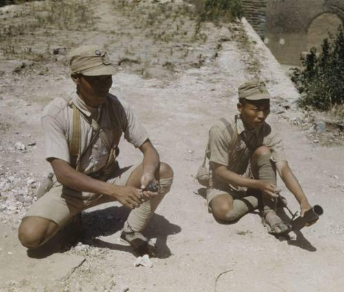 大戦中期頃、夏服の国民革命軍兵士。